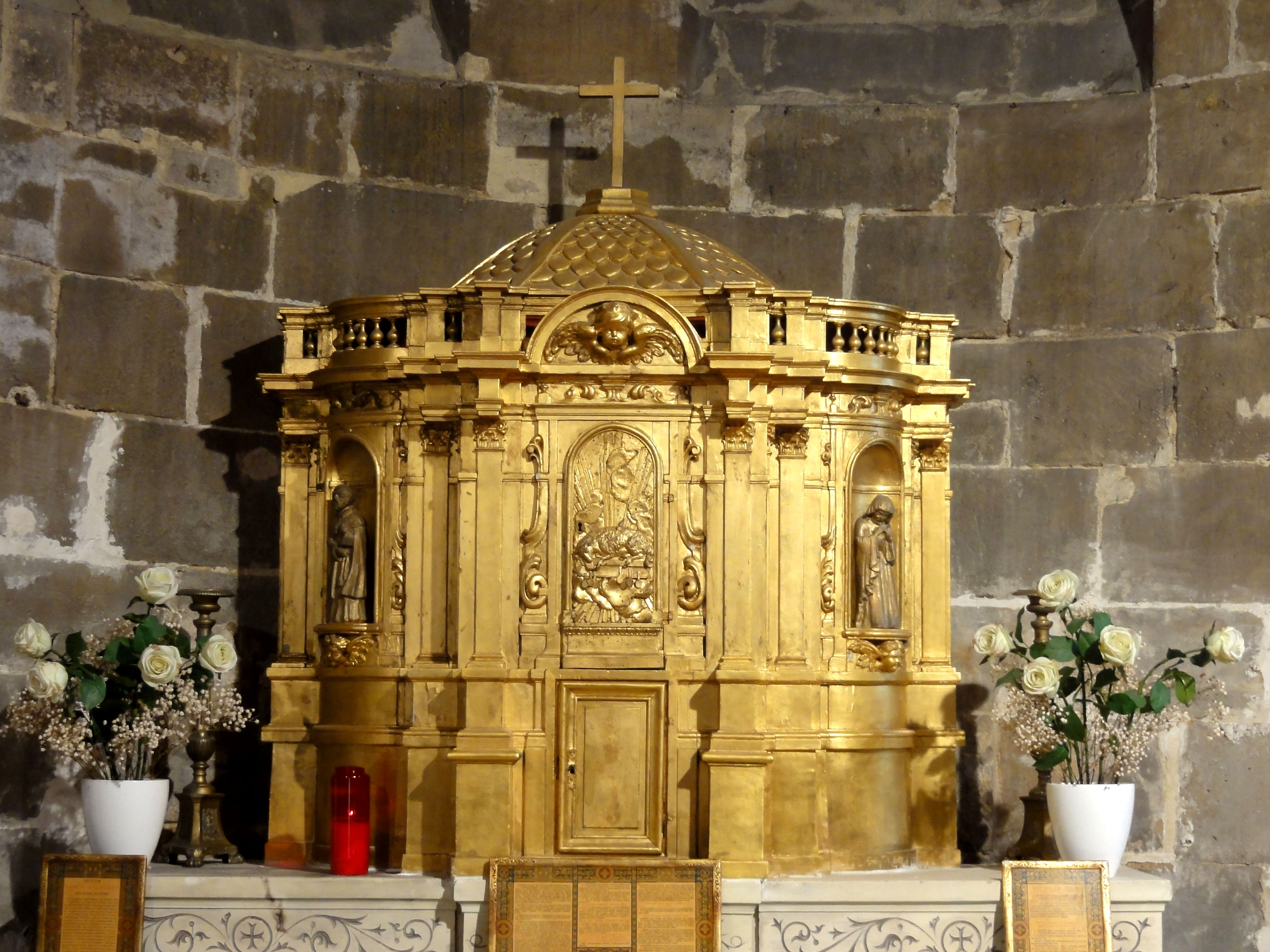 Tabernacle en bois doré de l'absidiole romane.